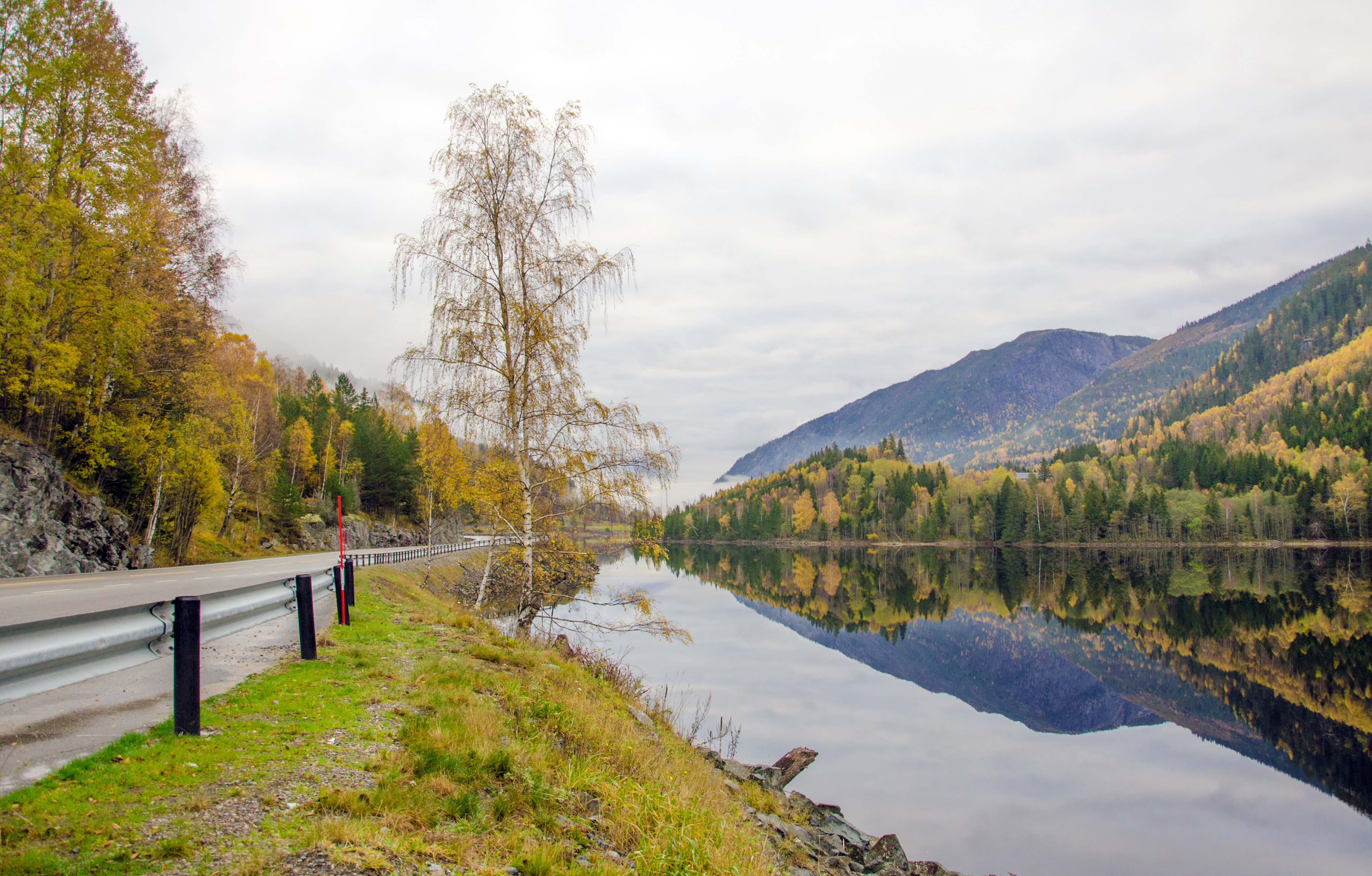 Europavei 134